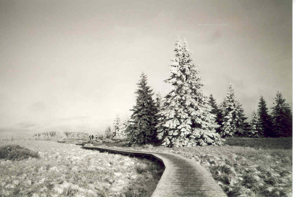 Typische Landschaft innerhalb des Hohen Venns (Deutschland oder Belgien)